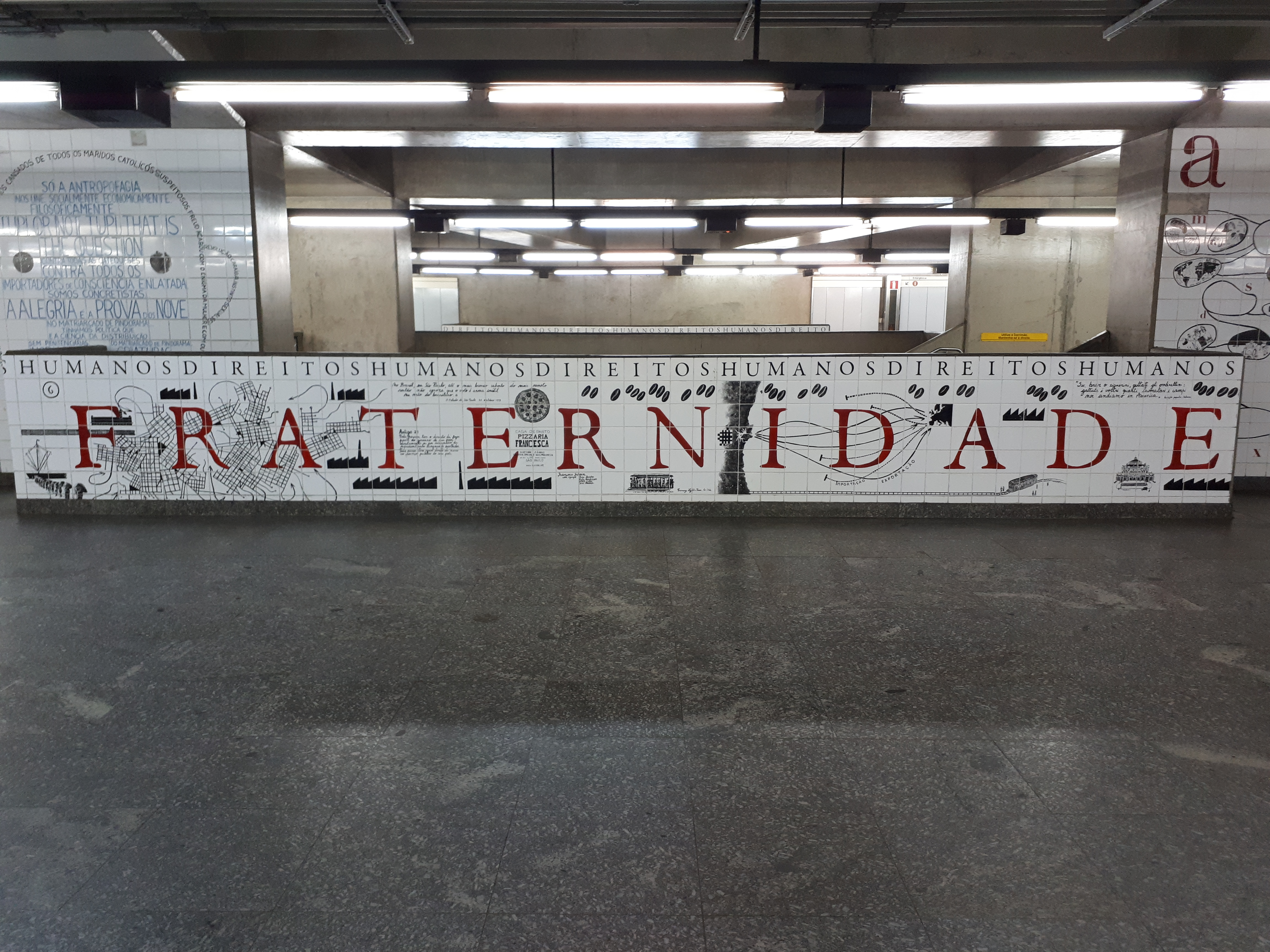 Mural localizado na estação da Luz, na baldeação para a linha Azul do metrô, em São Paulo (SP), Brasil. Nos azulejos, há a palavra "Fraternidade", uma das palavras relacionadas aos Direitos Humanos, além de haver artigos da Constituição e desenhos. Esta parede é apenas uma das partes da obra "Inscrever", composta por outros murais com dizeres.